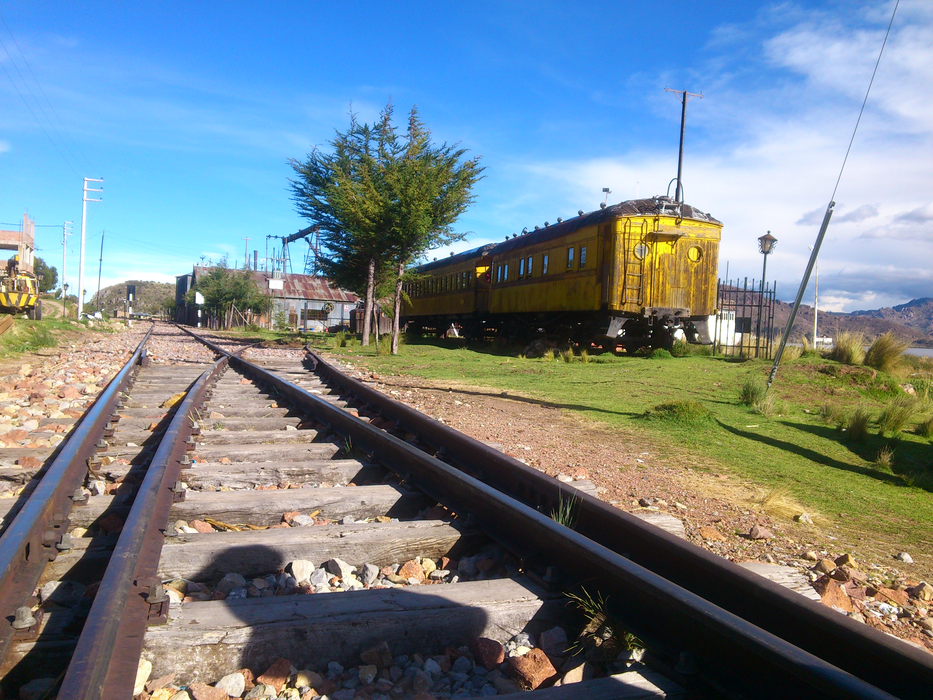 Puno Maravilla Natural